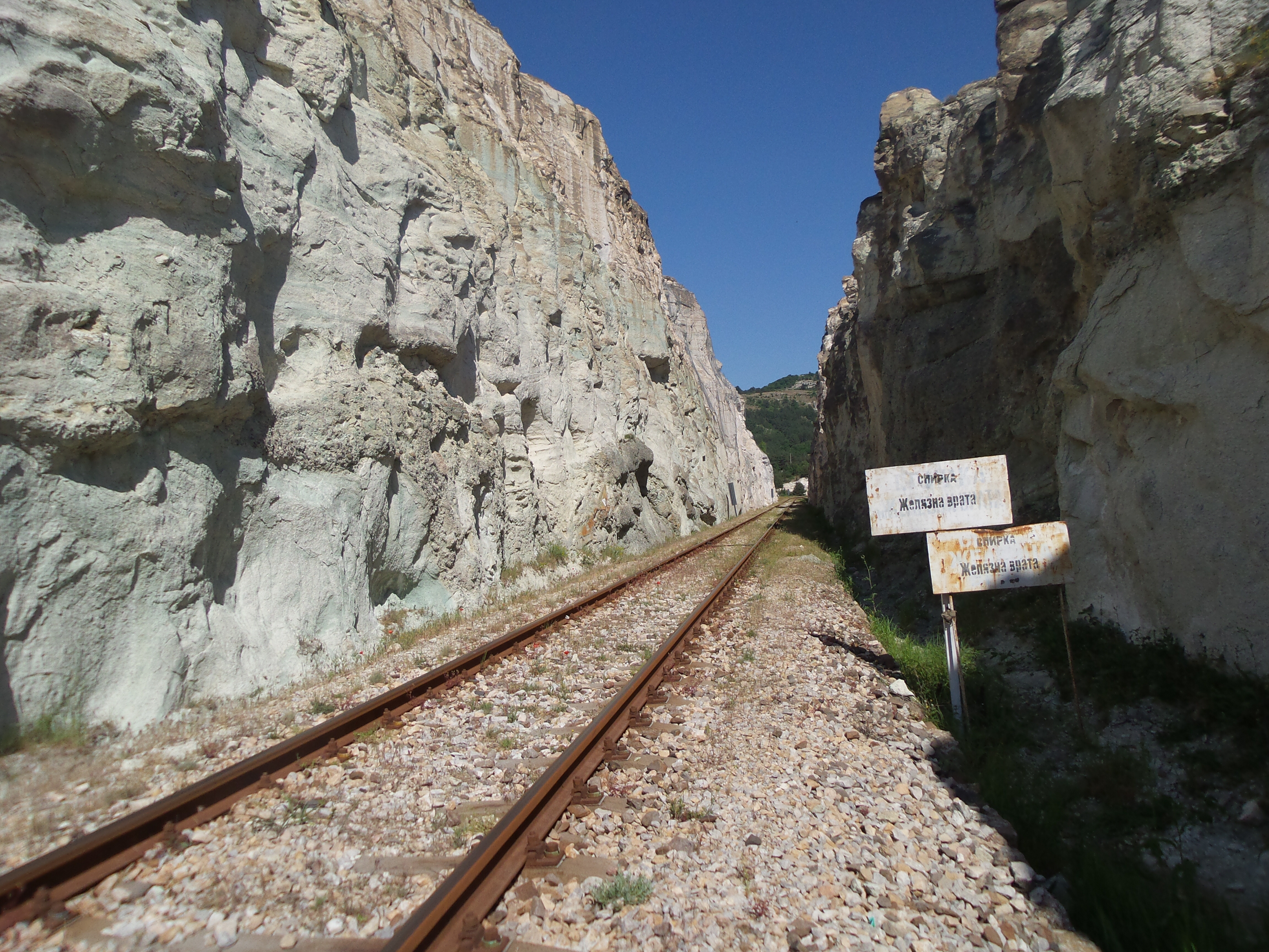 Скална теснина при спирка "Желязна врата".